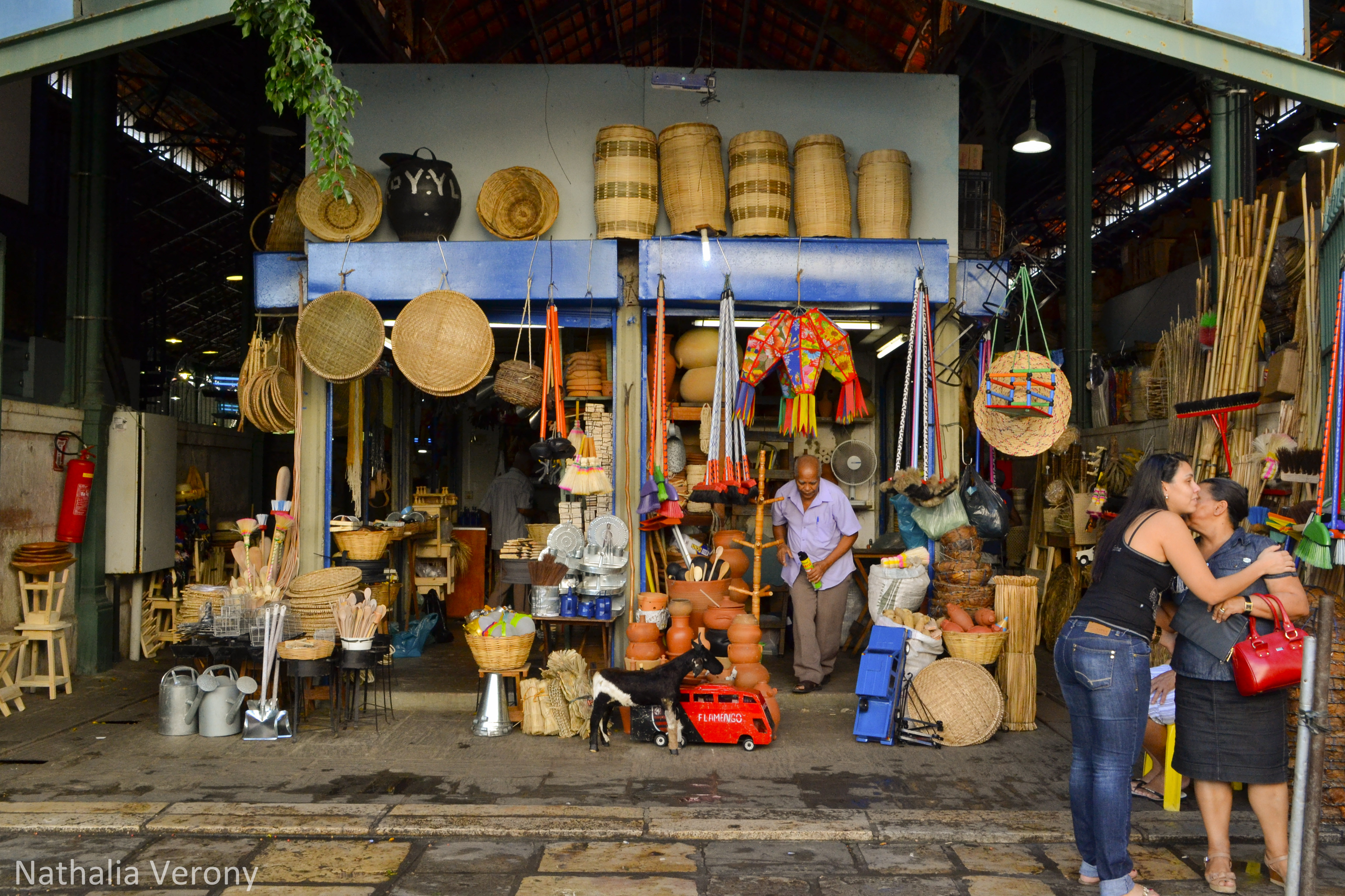 Mercado de são José - Recife -Pernambuco